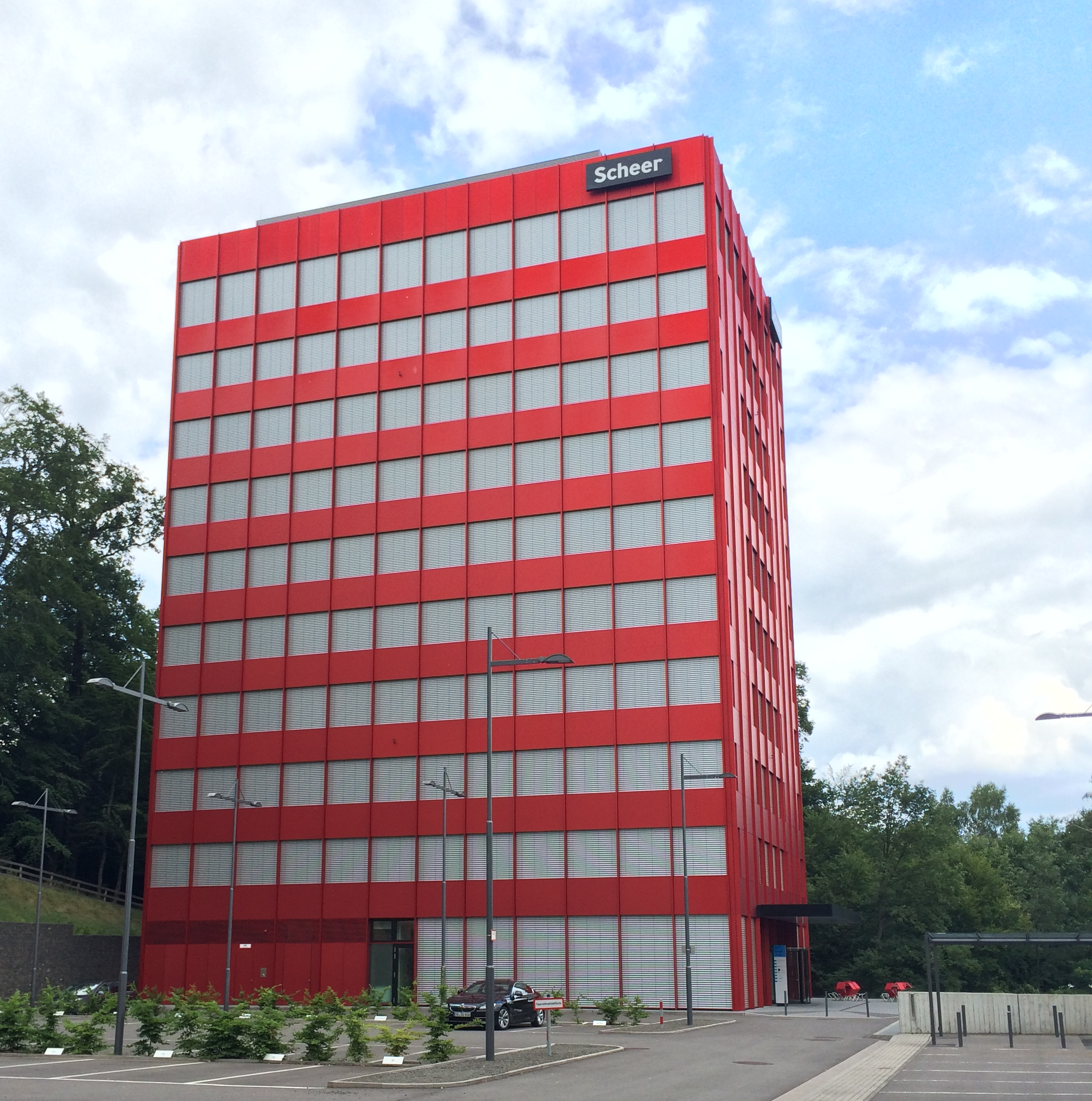 Hauptsitz der Scheer GmbH am Campus der Universität des Saarlandes